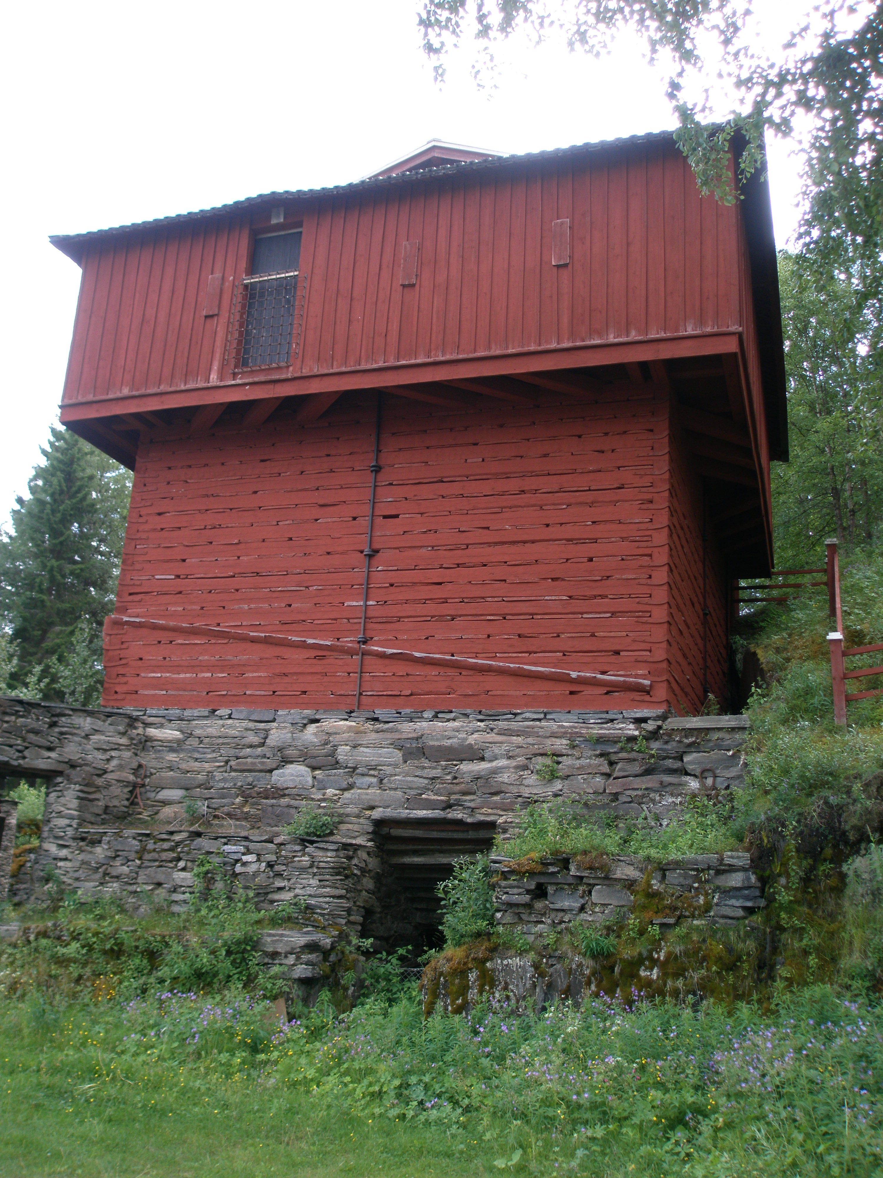 Järnbruksruinen i Rönnöfors, Offerdals socken, Krokoms kommun, Jämtland, Sverige.